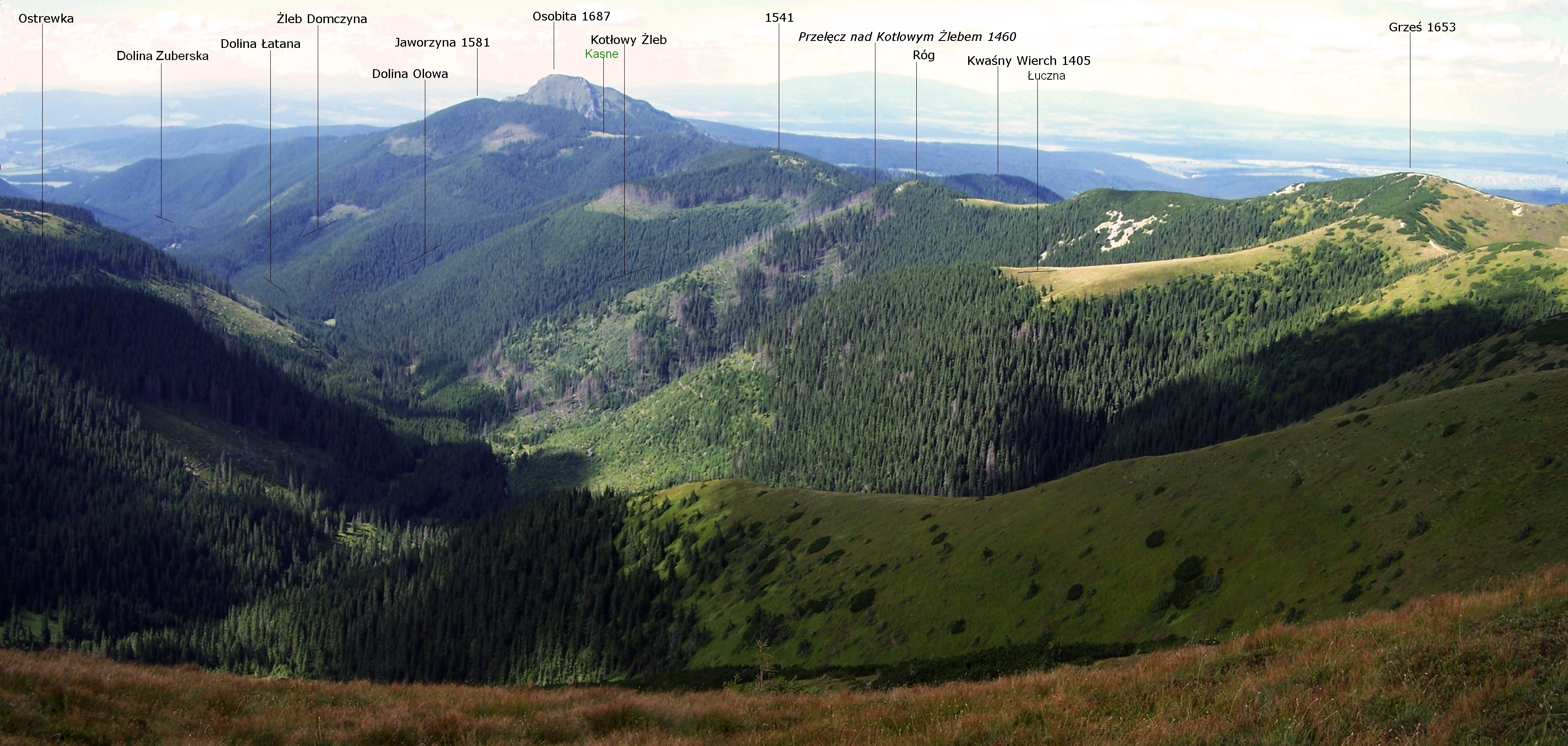 Widok z Długiego Upłazu na Dolinę Łataną i grań Grześ - Osobita